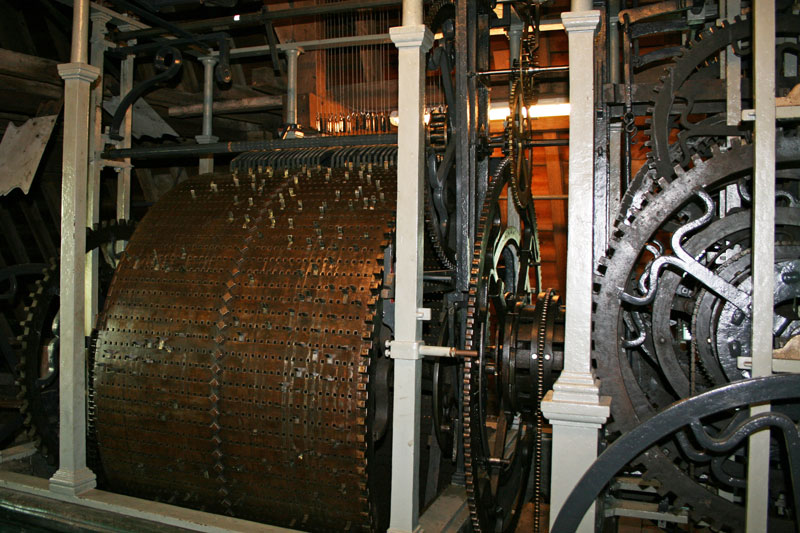 Trommels van het Stadhuis van Veere